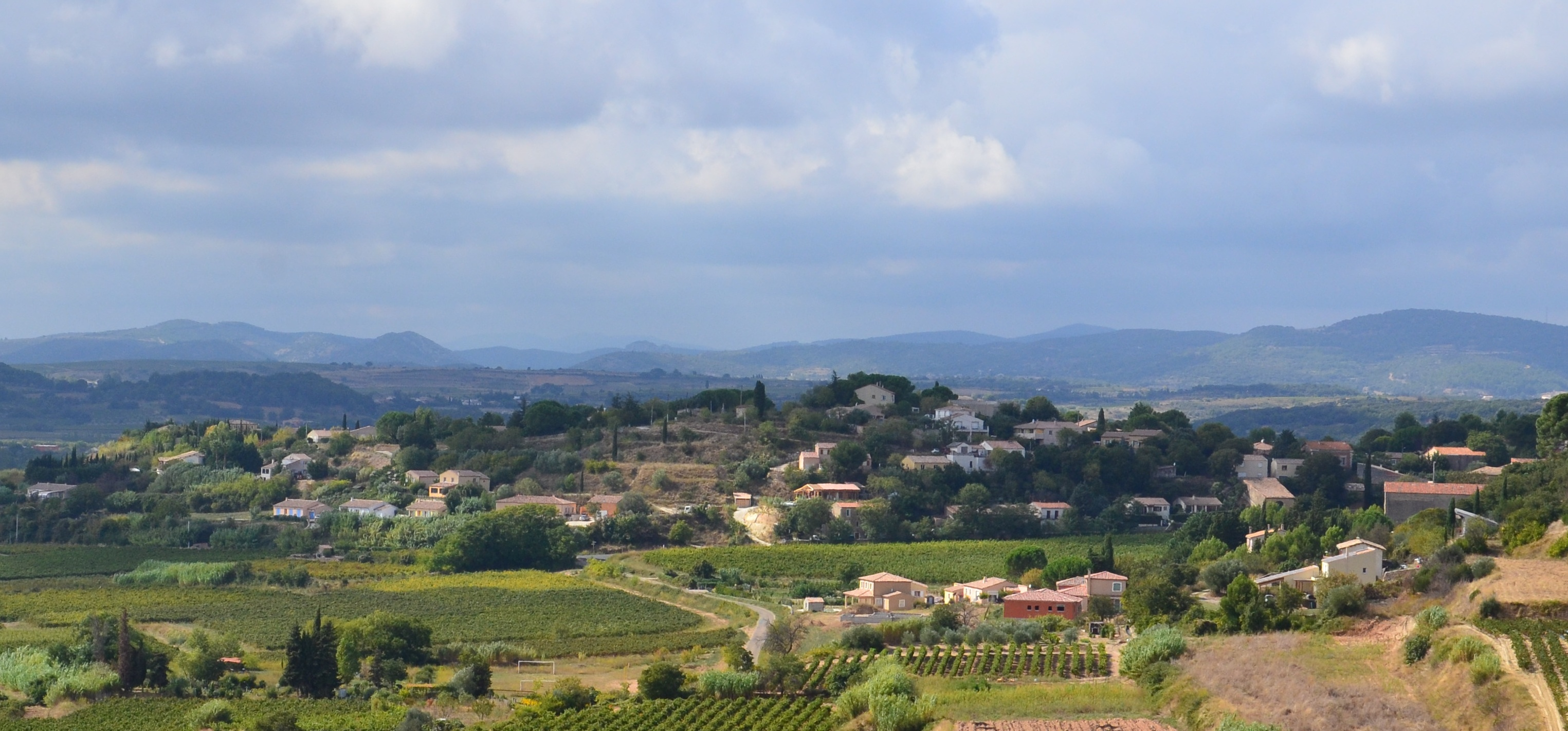 Tressan (Hérault), partie sud du village.